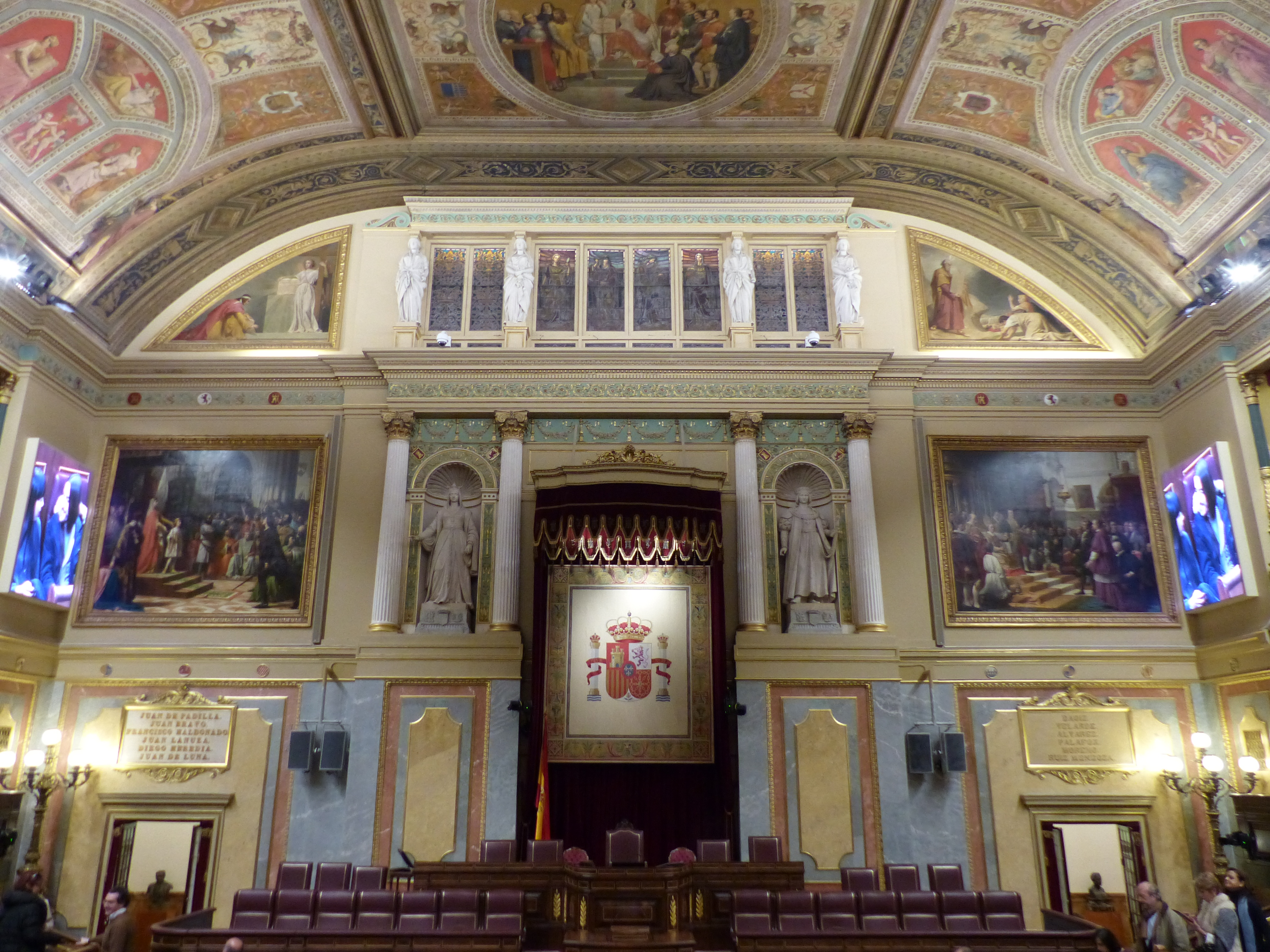 Congreso de los diputados, Tribuna